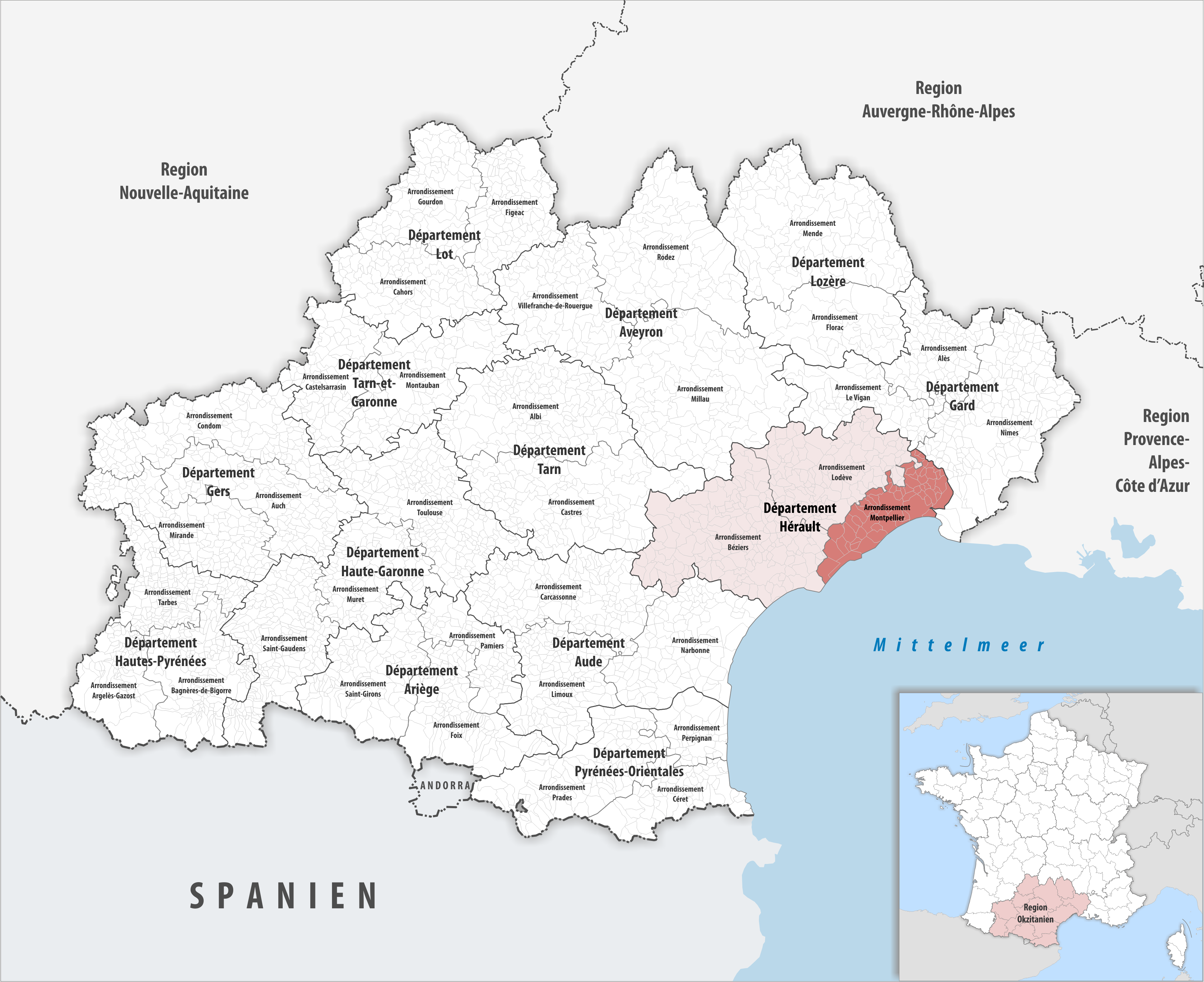 Lage des Arrondissements Montpellier